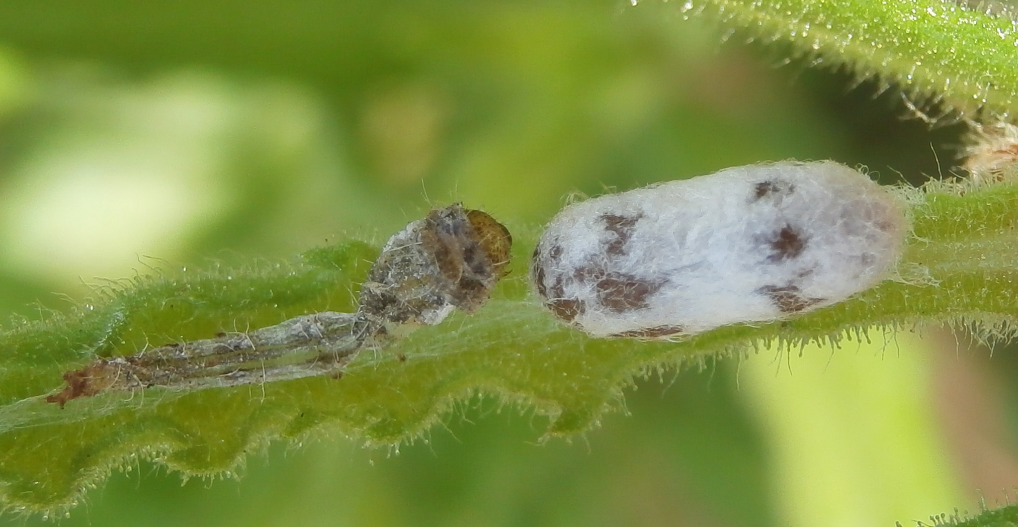 Une femelle Hyposoter sp (Campopleginae) a émergé de ce cocon tissé près de la dépouille de la chenille hôte, sur inule visqueuse (Dittrichia viscosa)